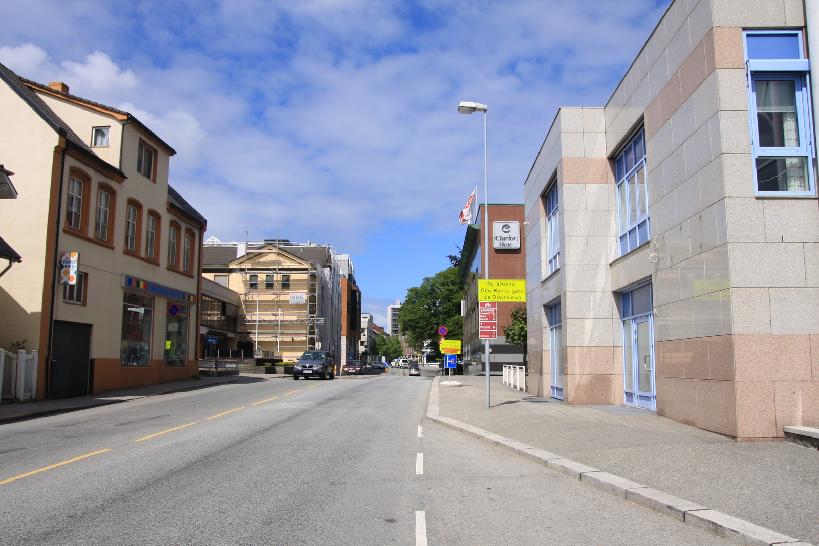 Fylkesvei 446 (Løkkeveien)